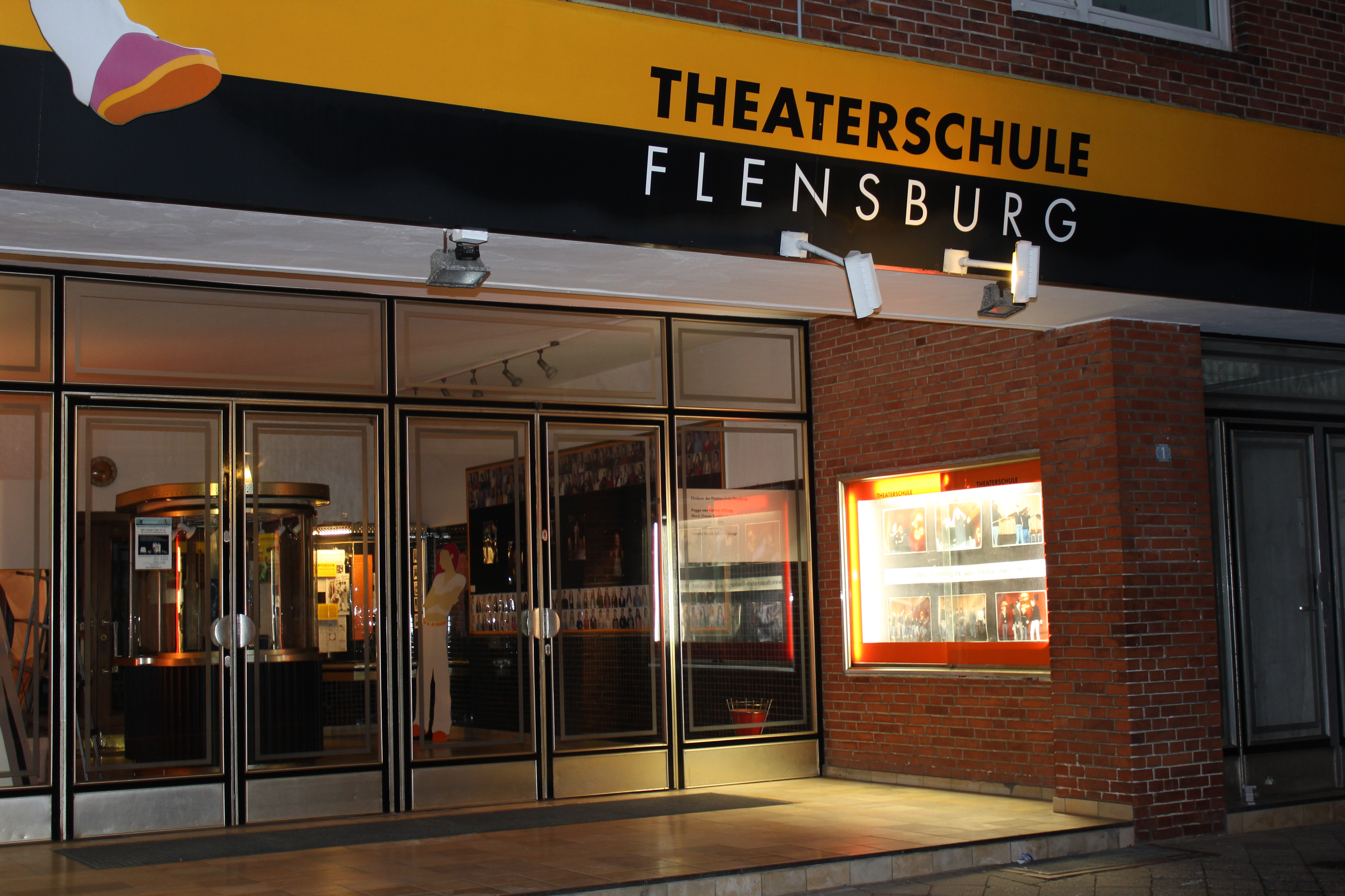 Theaterschule Flensburg im Palast-Theater Gebäude, Bild 01